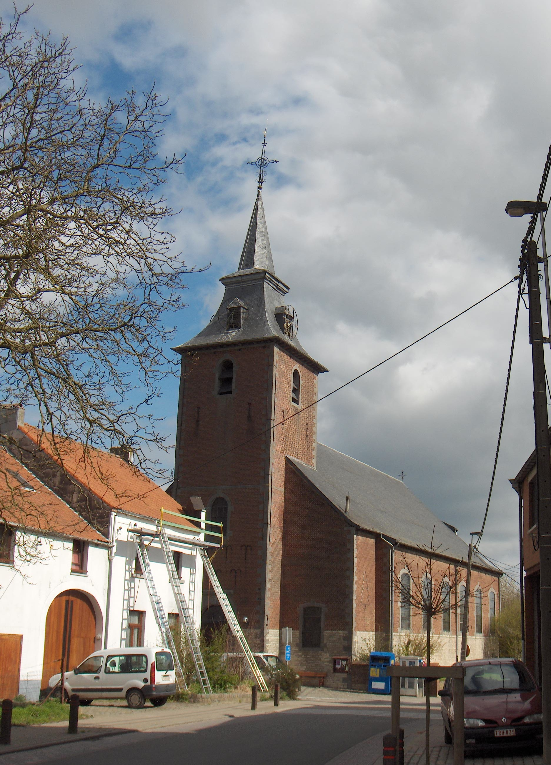 Corroy-le-Grand, village avec église (Belgique, prov. de Brabant wallon)